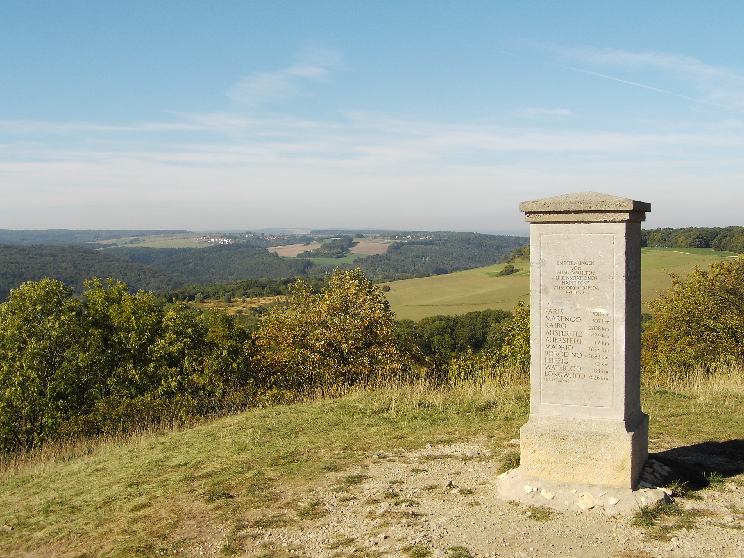 Napoleonstein im Naturschutzgebiet „Windknollen“ in Jena